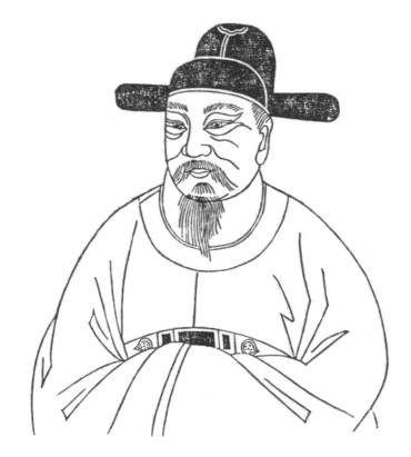 胡晓（1514年－1566年），南直隶徽州绩溪（今属安徽省）人 ，明朝官员。嘉靖二十六年丁未科二甲进士。任翰林院庶吉士，官至四川道监察御史。